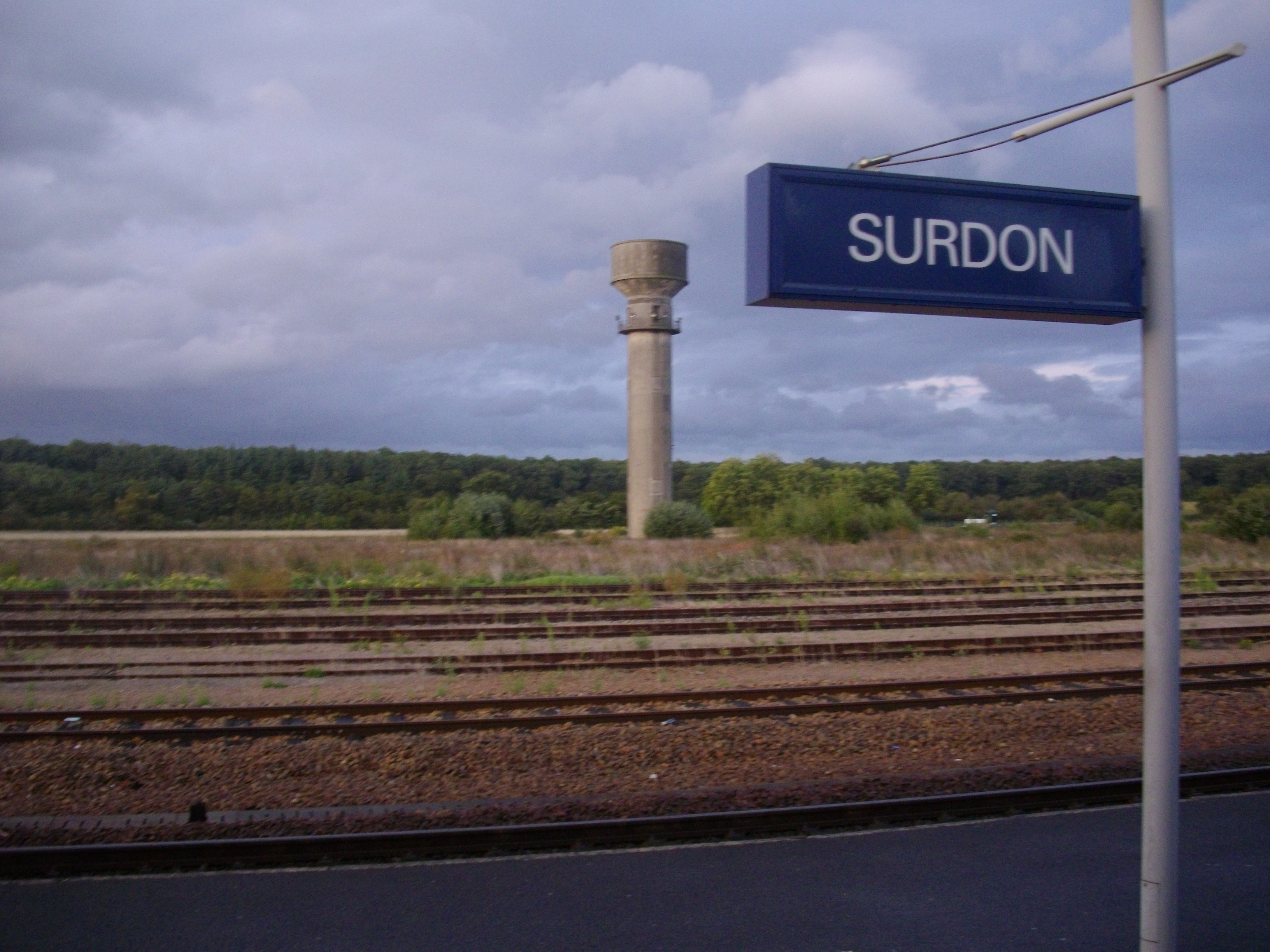 Gare de Surdon